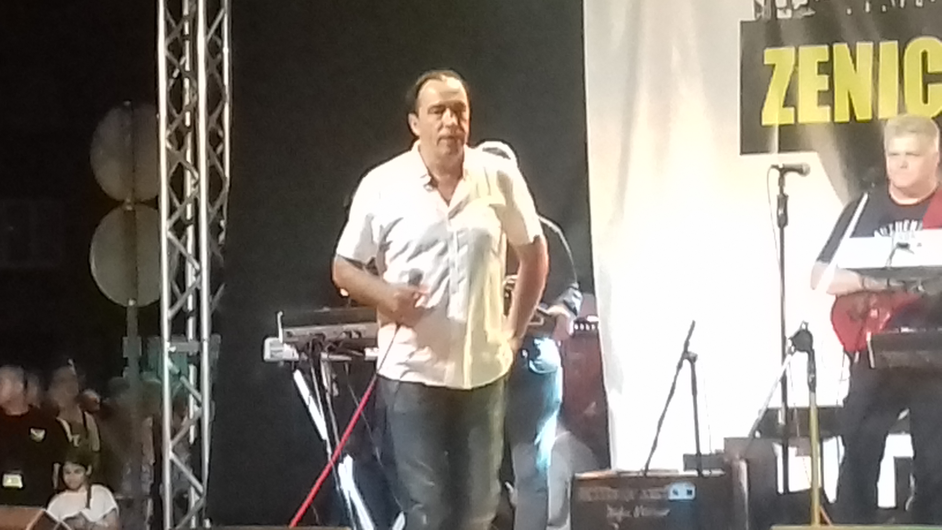 Nihad Fetić Hakala, Svjetski a naši, 15. noć Zenica summer festa